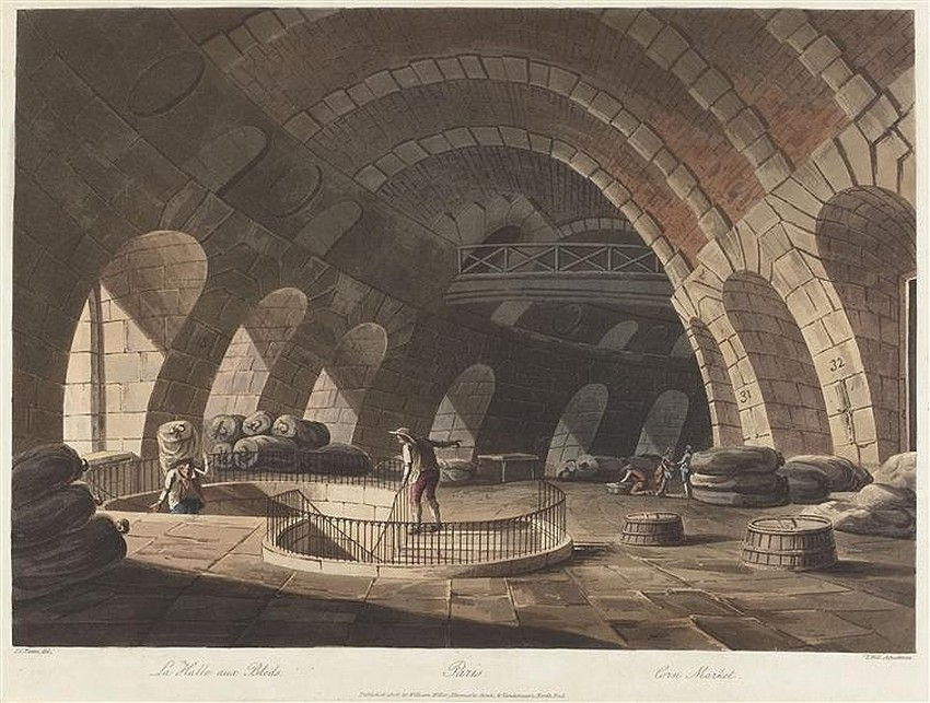 Ansicht des gewölbten Dachbodens der früheren Getreidehalle, heute Warenbörse in Paris